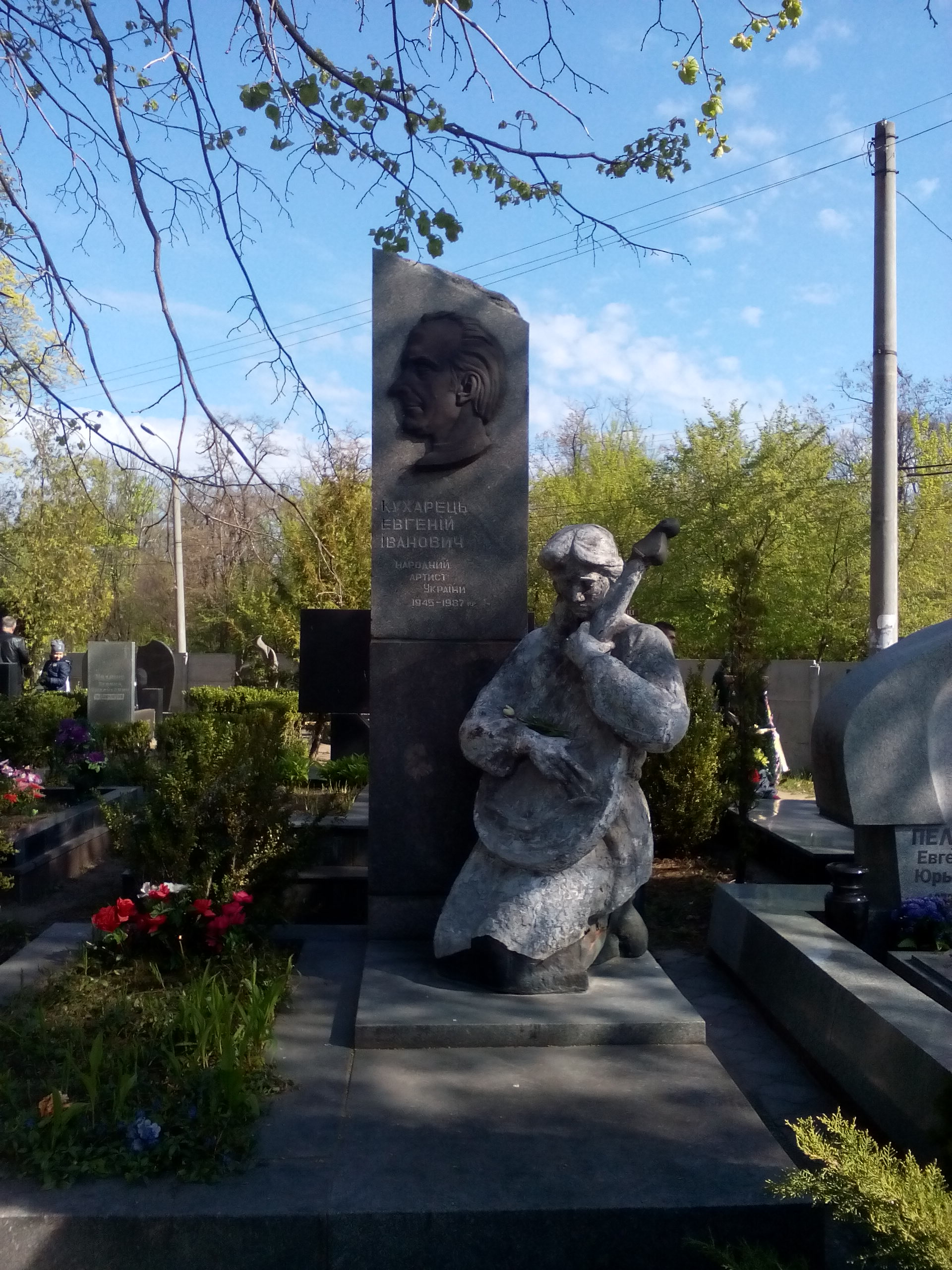 Могила Є.І.Кухарця на міському кладовищі міста Черкаси